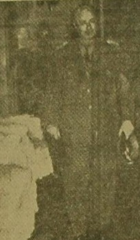 Vicealmirante Leandro Maloberti